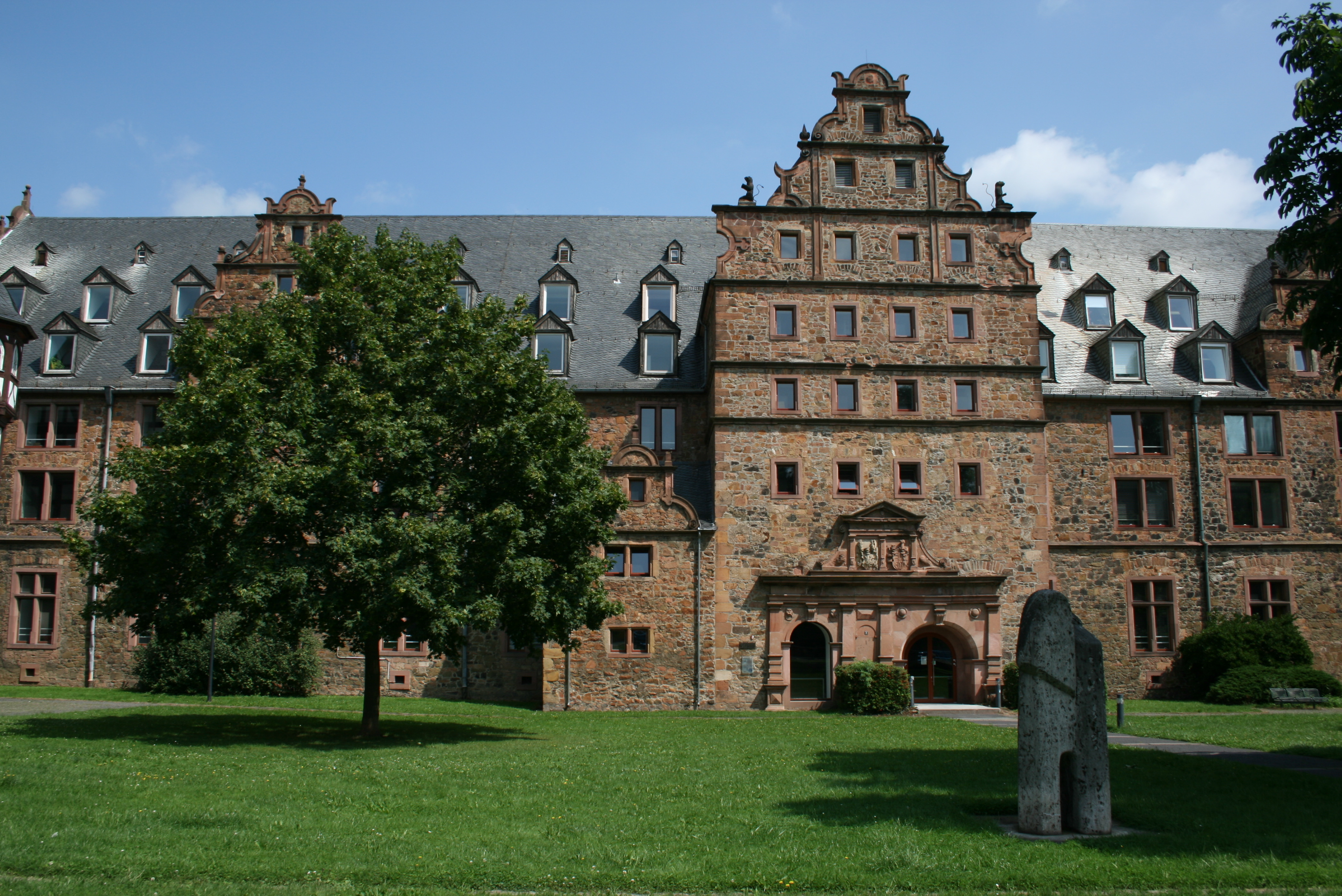 Zeughaus in Gießen/Giessen, Germany